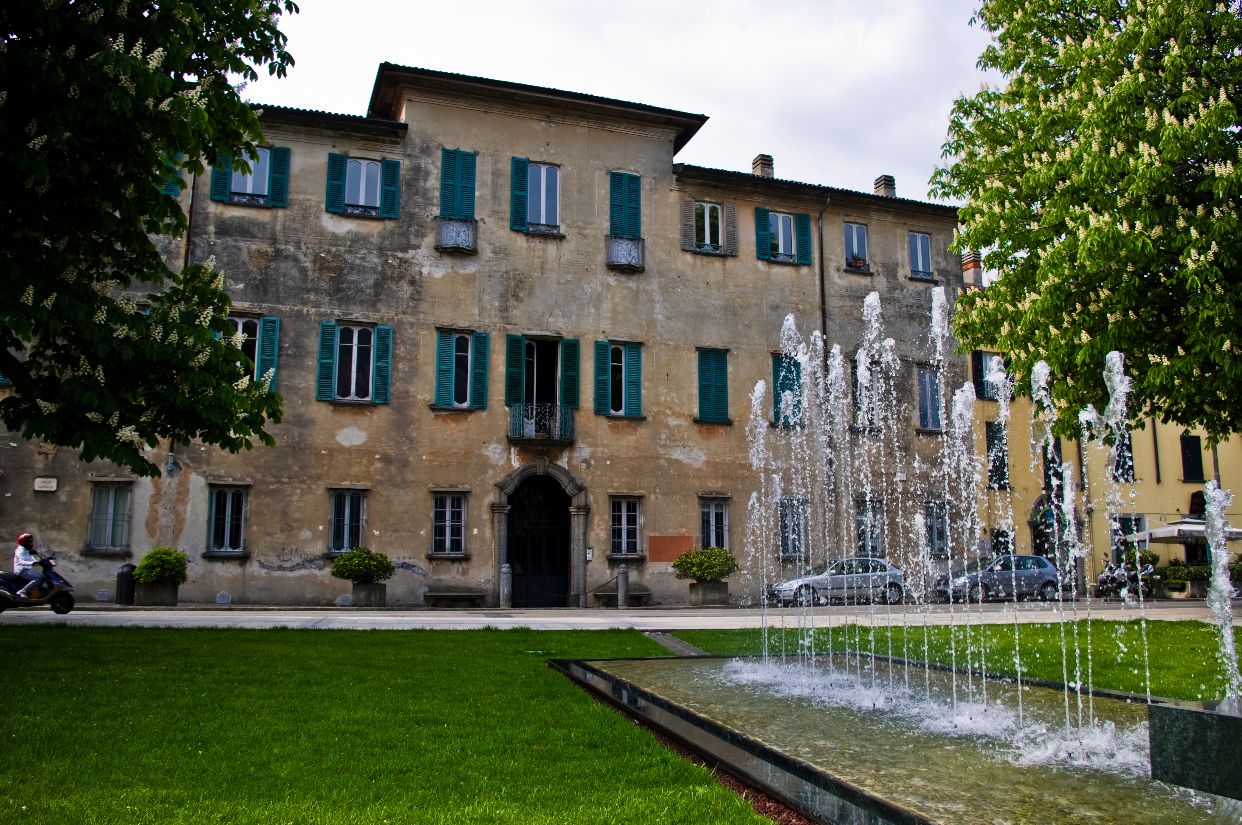 Ampliato nel 1764-1765 dal canonico Giuseppe Candido Agudio, accademico dei Trasformati, prima era un palazzotto dove venivano ospitati gli accademici e dove nacque l'idillio tra Luigi Giusti e la poetessa Francesca Manzoni (1741). Qui, secondo il Reina, Giuseppe Parini scrisse gran parte del Mattino e qui si ritirò nel 1776 con l'Agudio.